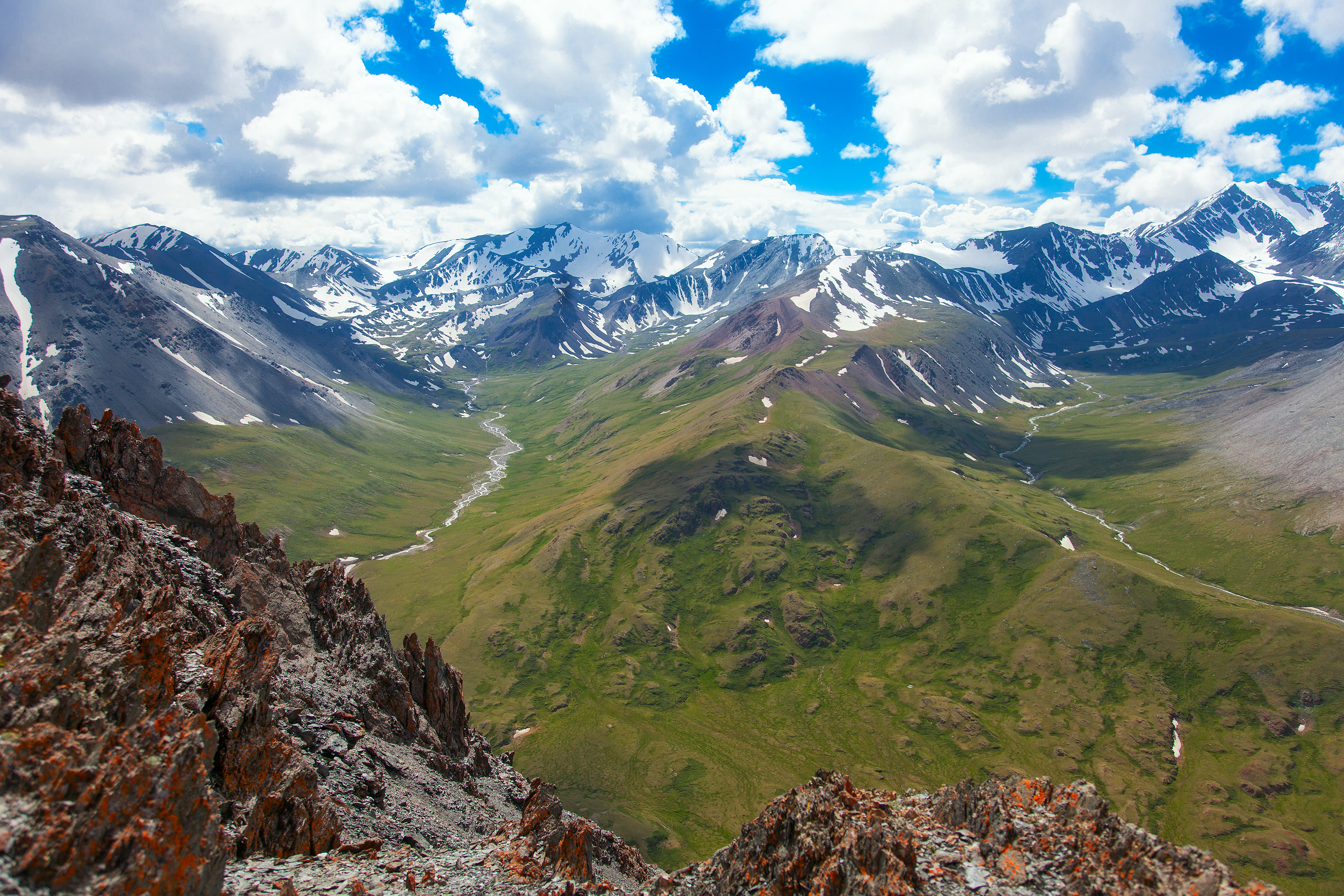 Долина Ирбисту